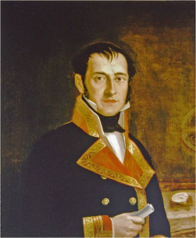 Retrato del político, geógrafo, astrónomo y capitán de navío español Felipe Bauzá (1764-1834).